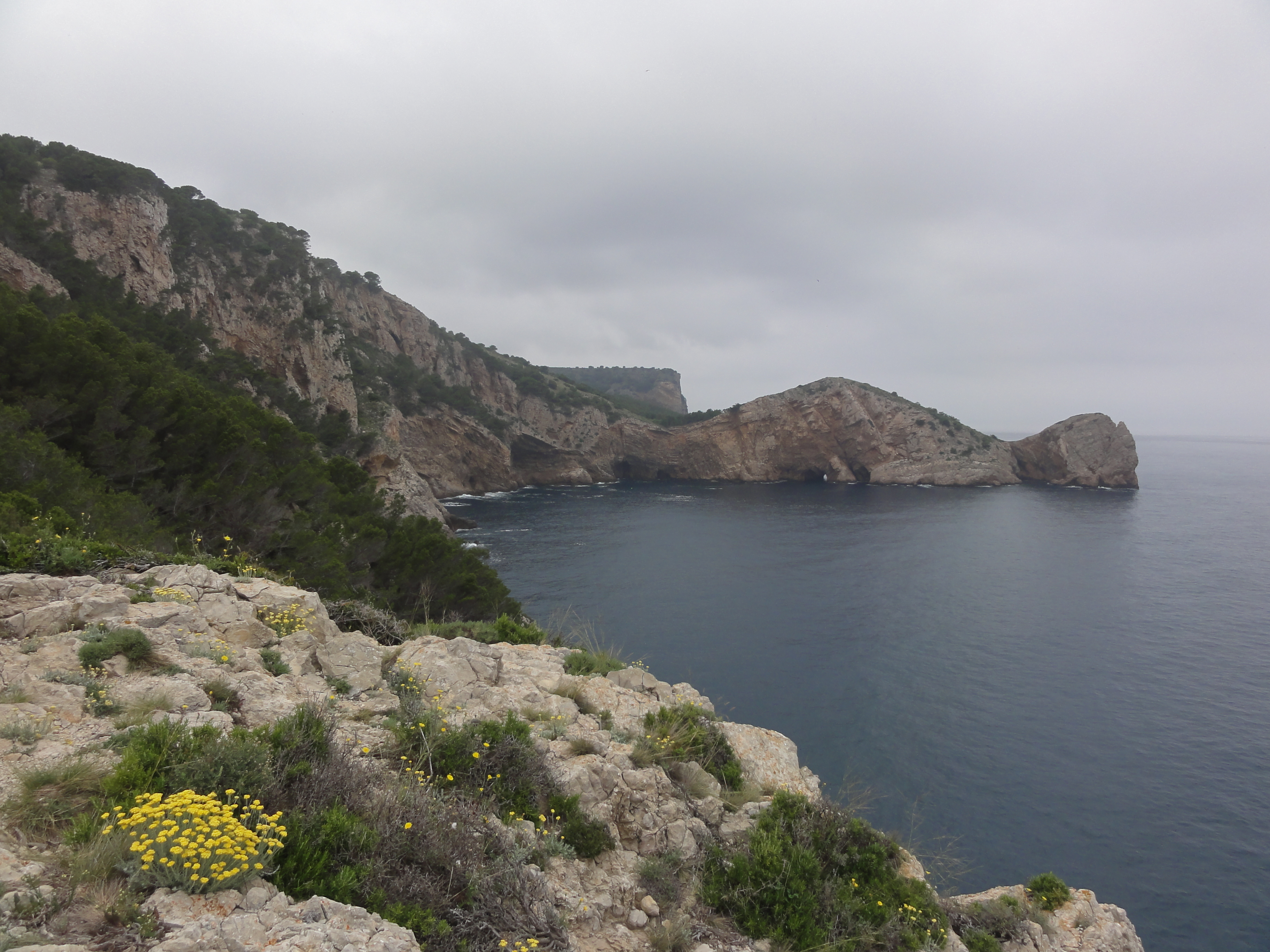 El Montgrí, les Illes Medes i el Baix Ter This is a a photo of a natural area in Catalonia, Spain, with id: ES510281